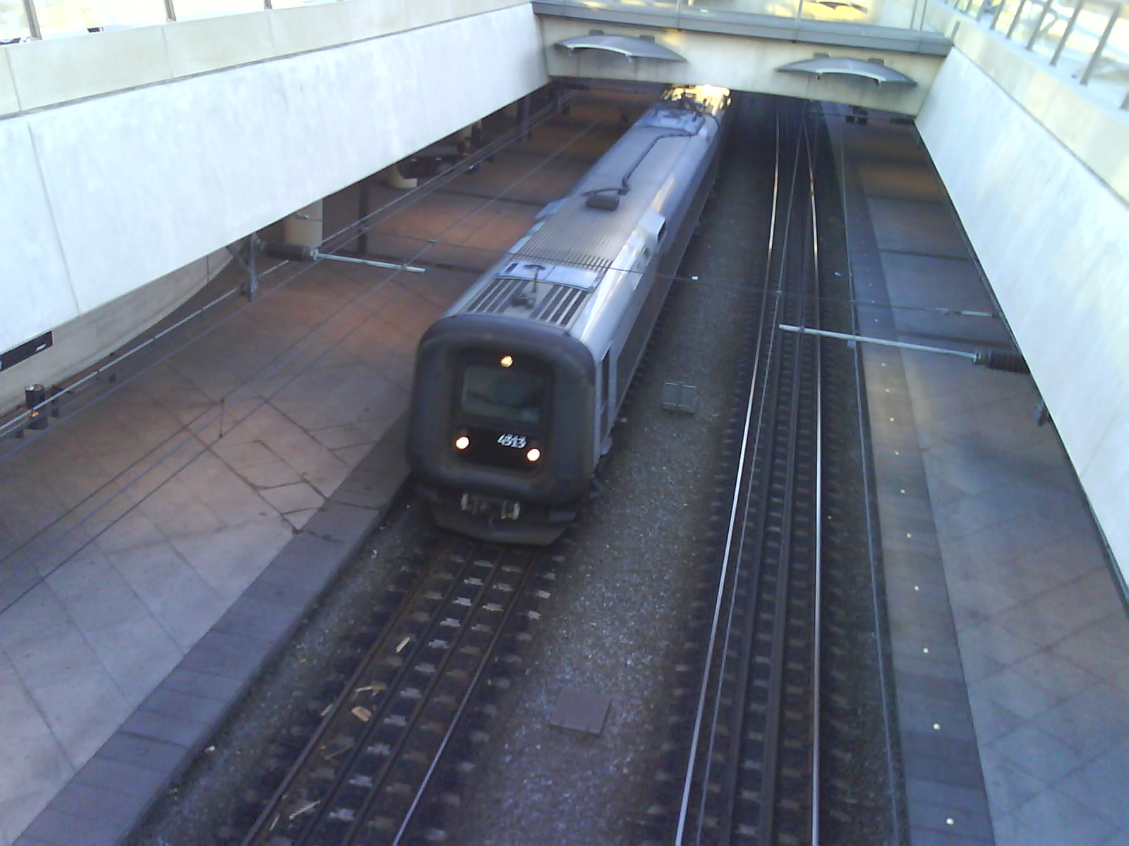 Kastrup train station öresundståg